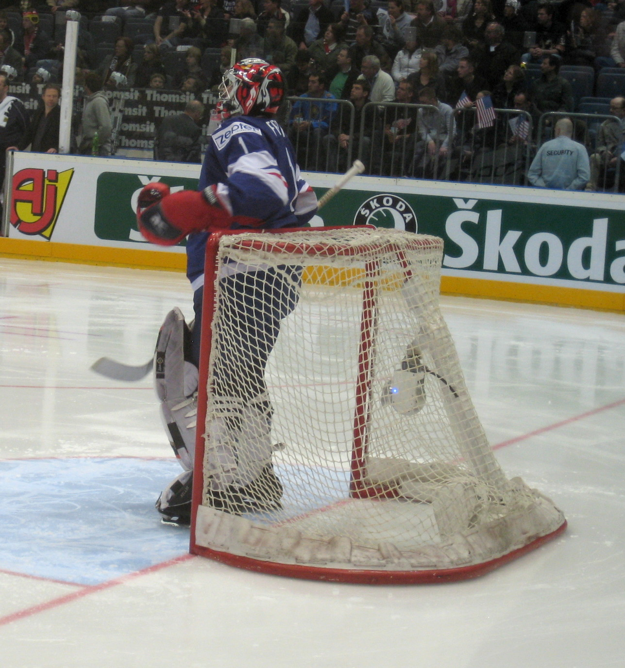 Der Torhüter der französischen Nationalmannschaft Eddy Ferhi Spiel 33, Abstiegsrunde, Eishockey-Weltmeisterschaft der Herren 2010 in der Kölnarena